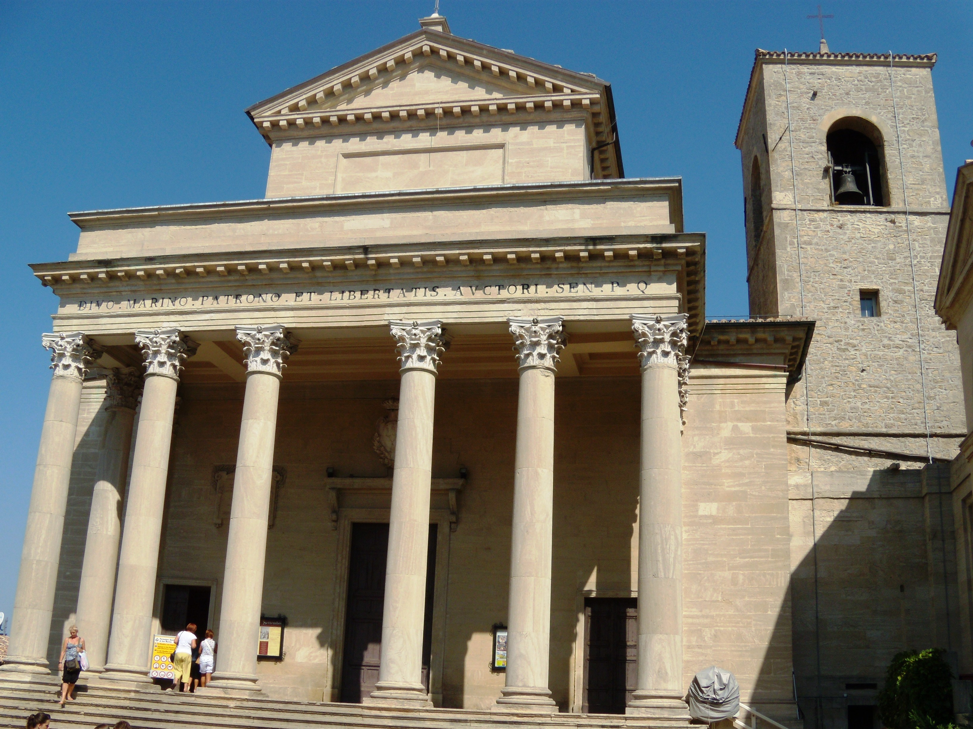 La Basilica della Repubblica di San Marino.